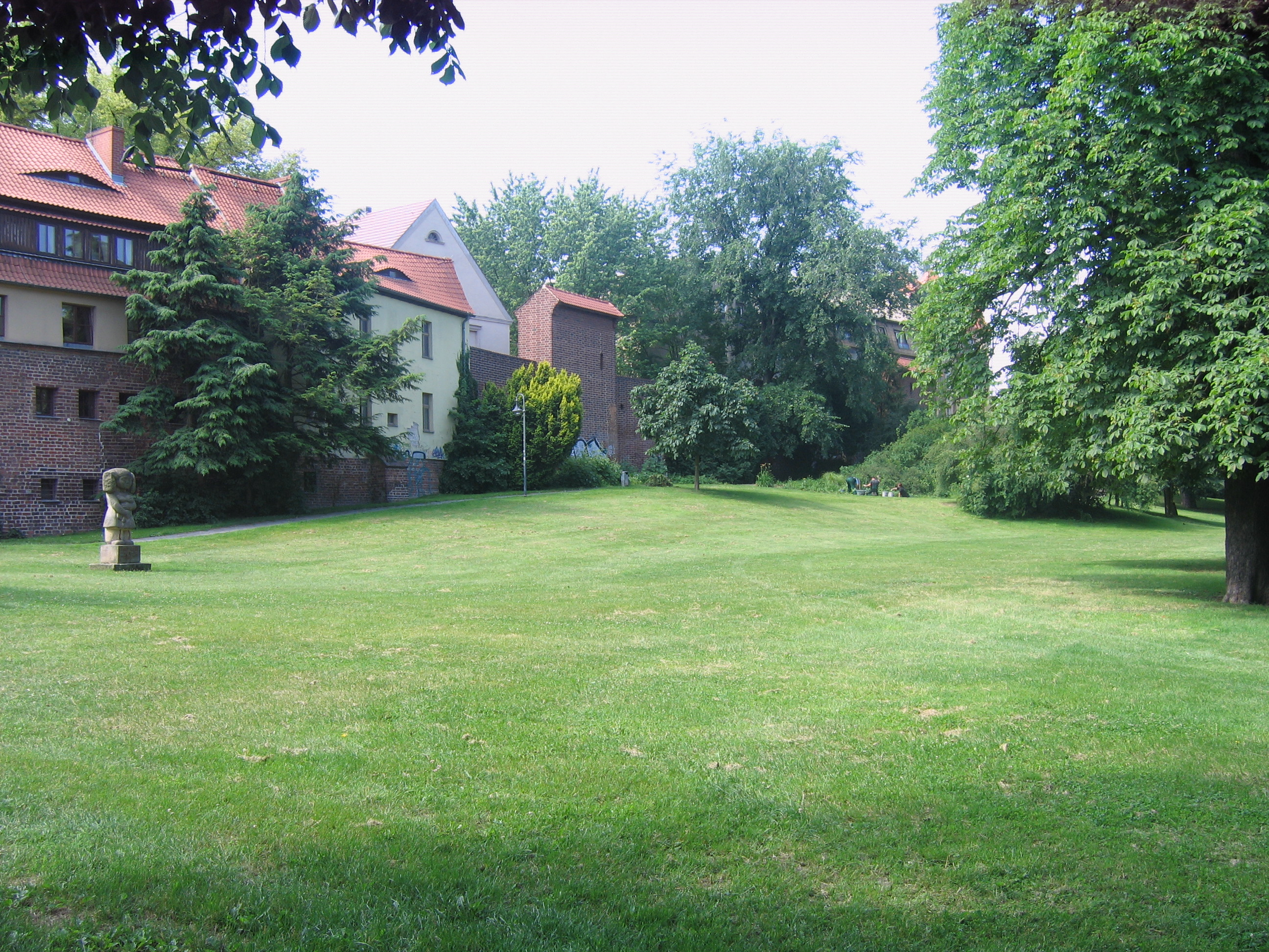 denkmalgeschützte Parkanlage Puschnikpromenade in Cottbus